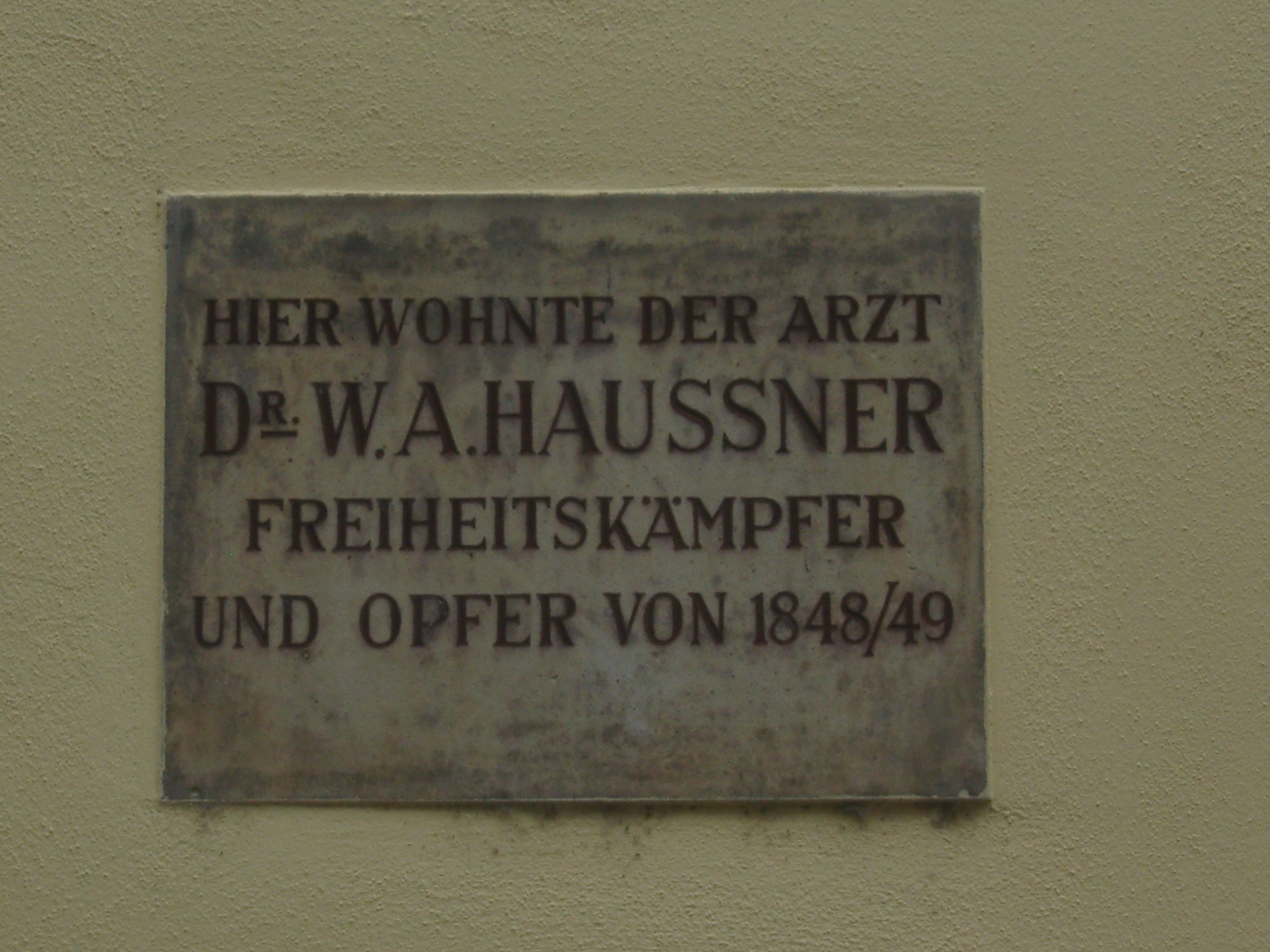 Gedenktafel für Wilhelm Adolph Haußner am denkmalgeschützten Haus Engelserker in der Barbierstr. 10 in Pirna aufgenommen von der Dohnaischen Straße aus